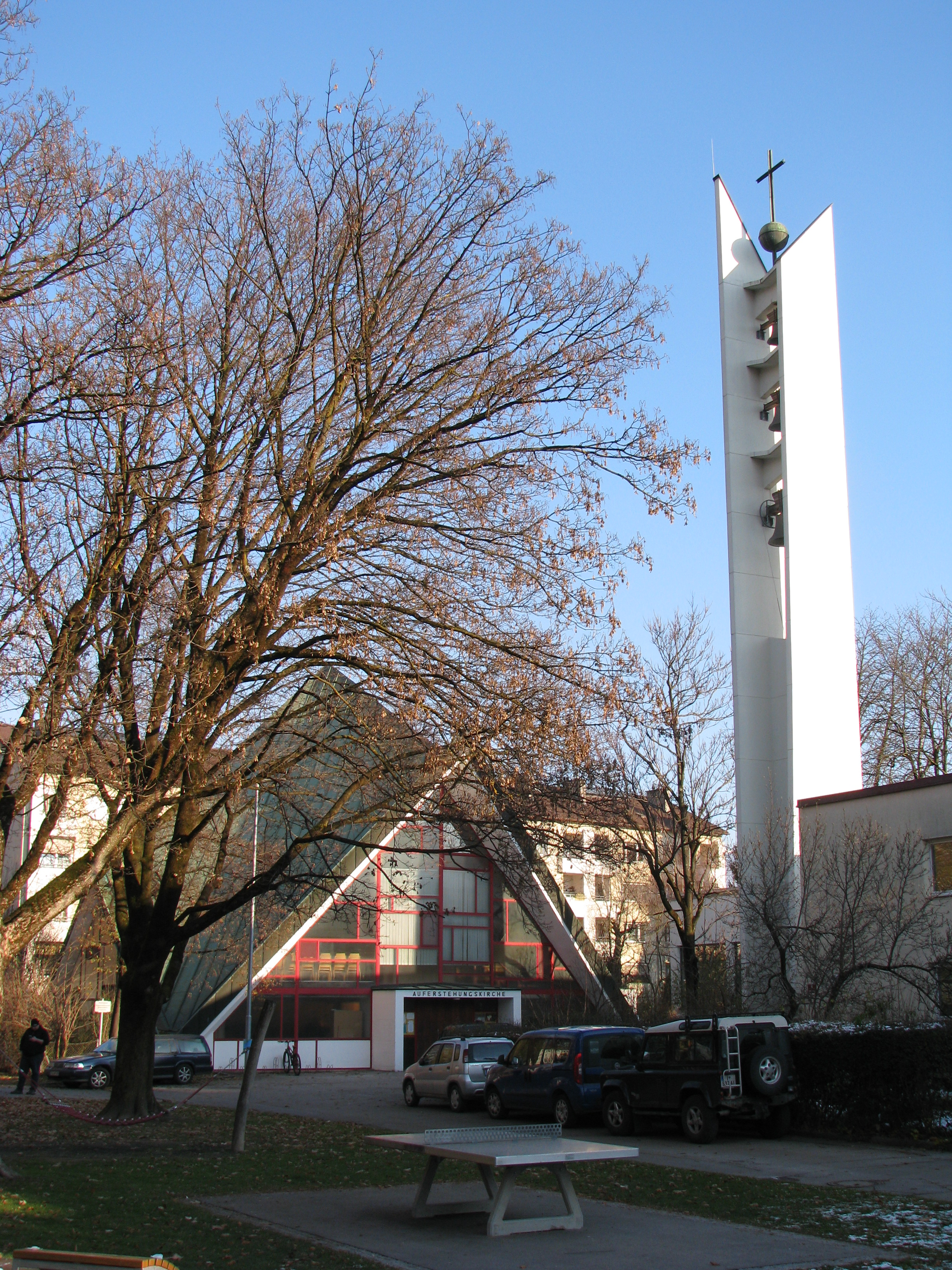 Auferstehungskirche Innsbruck-Reichenau This media shows the remarkable cultural object in the Austrian state of Tyrol listed by the Tyrolean Art Cadastre with the ID 72774. (on tirisMaps, pdf, more images on Commons, Wikidata)